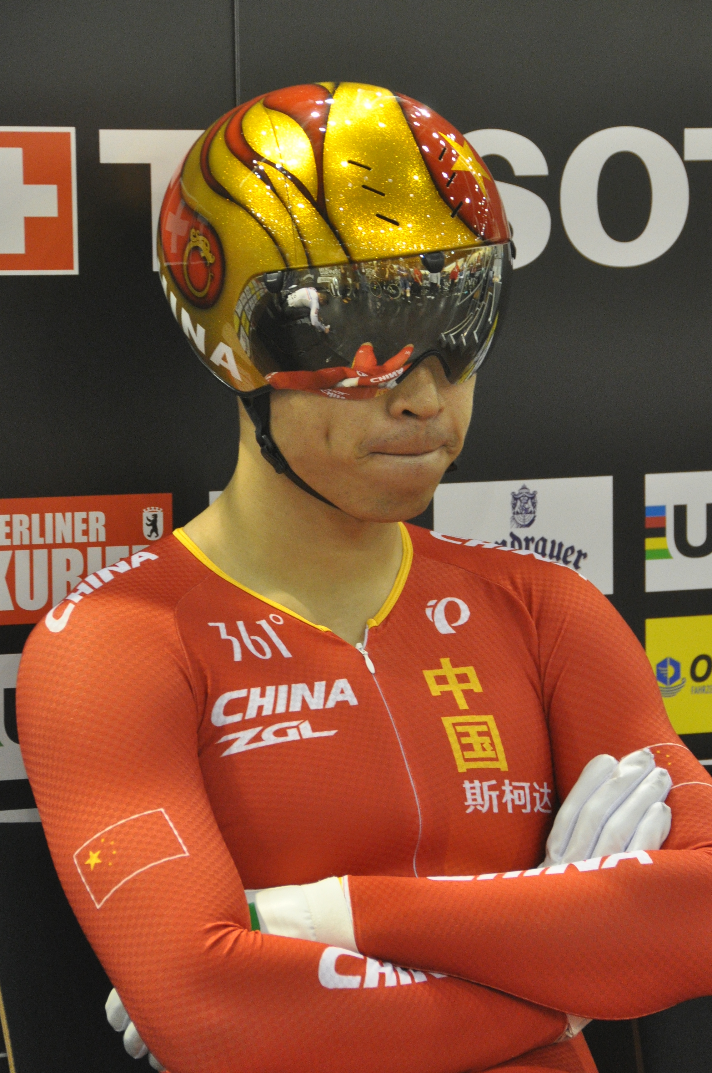 Xu Chao, chinesischer Radsportler